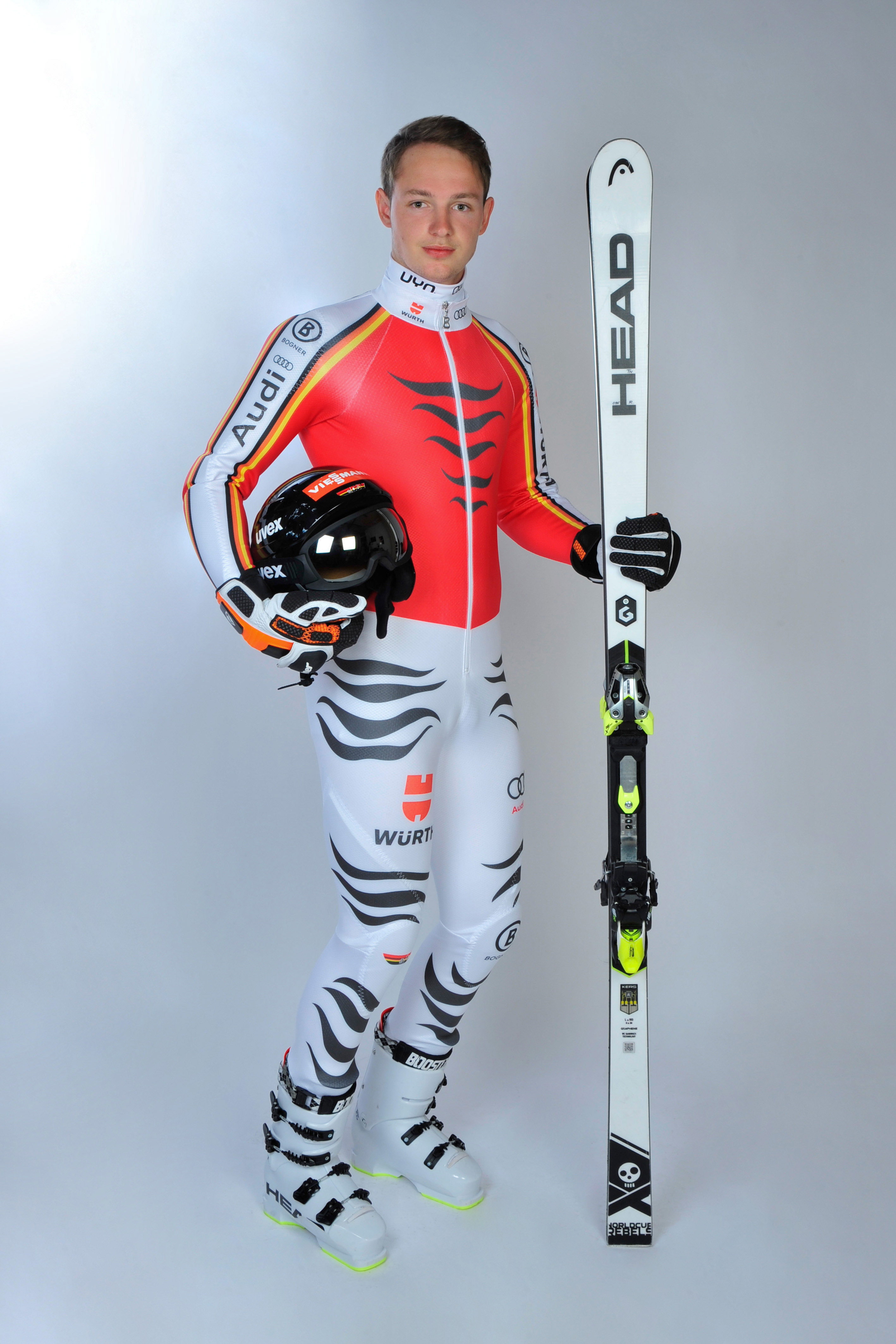 Tobias Neuber, 2019